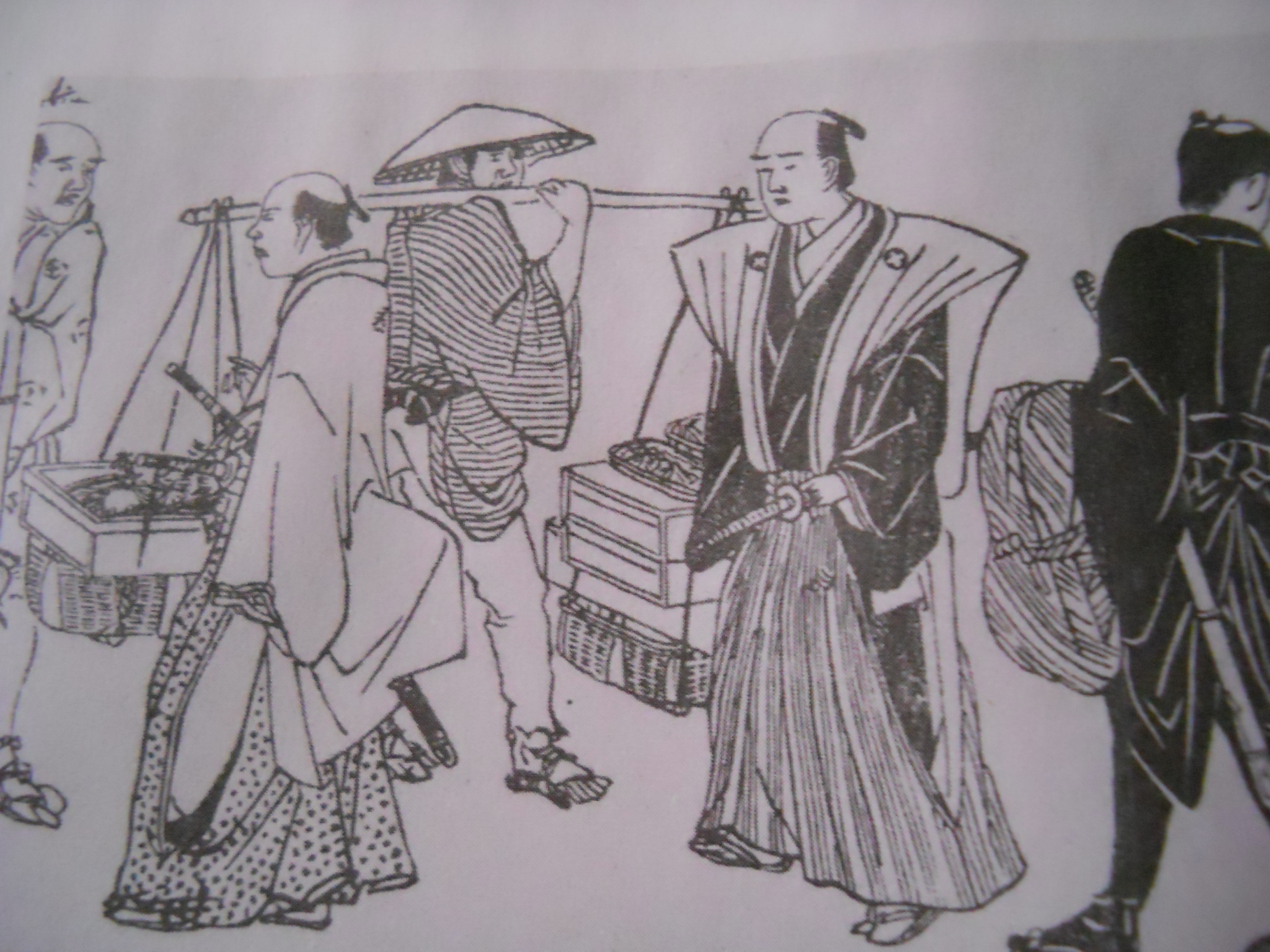 Samurai